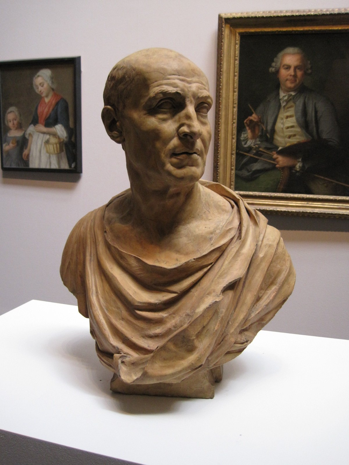 Cicéron - Terre cuite - Luc Breton - Musée des Beaux-Arts de Besançon